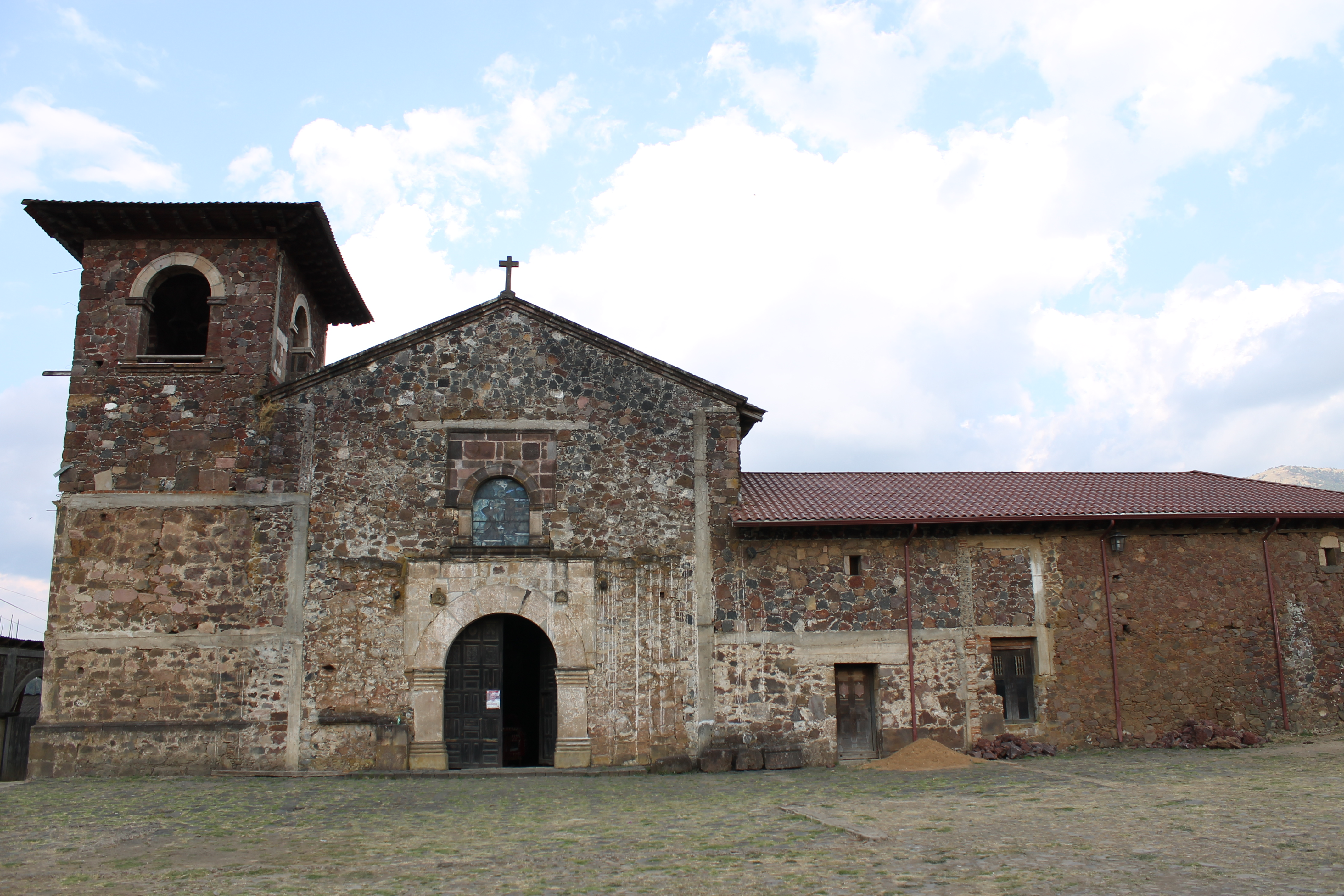 Iglesia de San Francisco Corupo